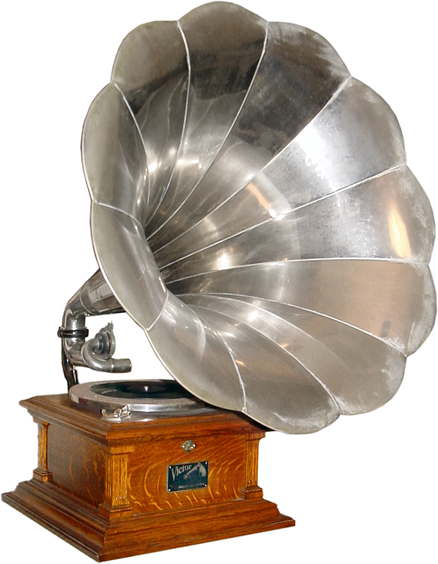 Victor III Disc Phonograph (Gramophone) ca. 1907